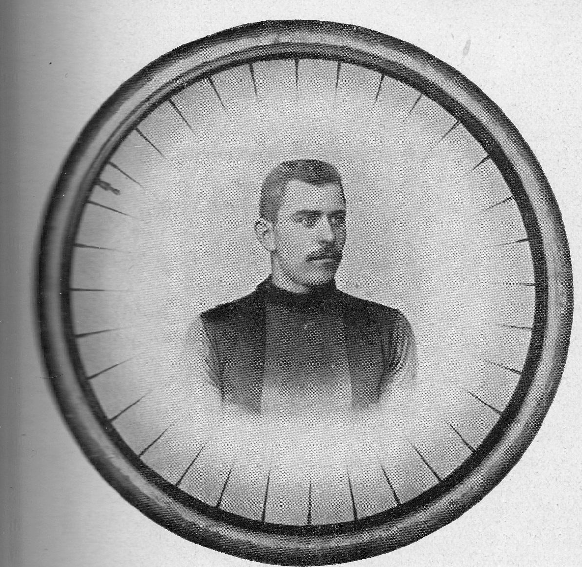 Henri Luyten (1873-1954), belgischer Radsportler